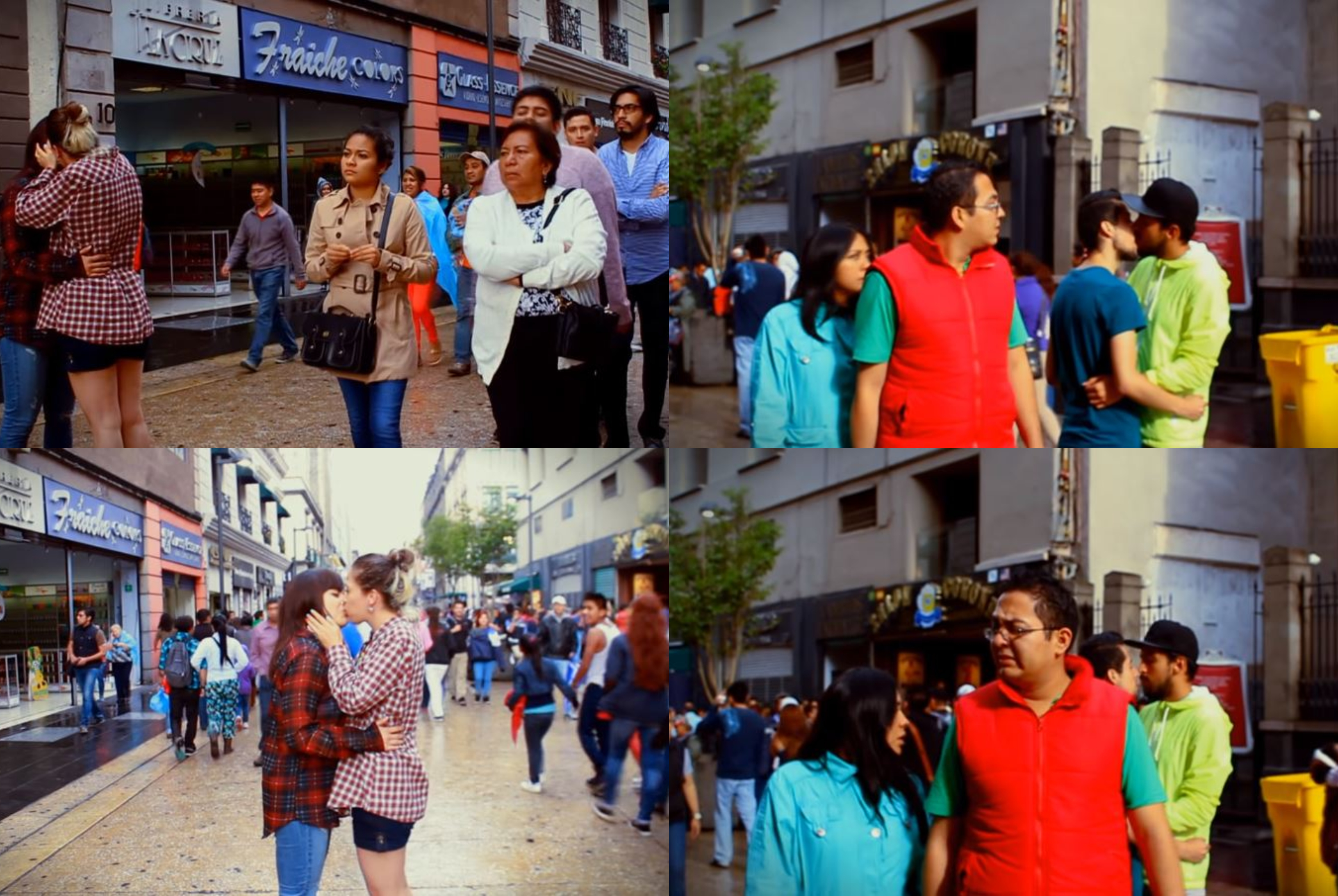 Un collage con fotografías de como viven las parejas homosexuales en México.